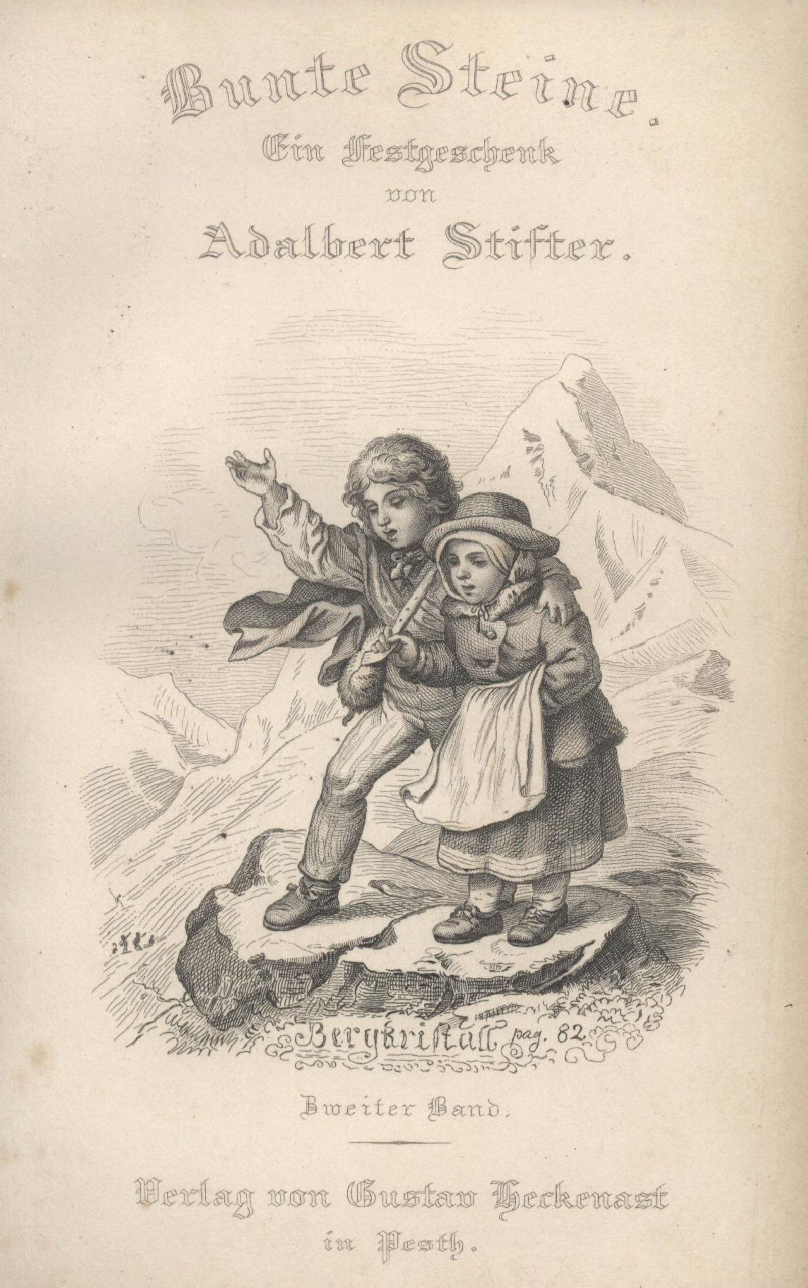 Frontspiz des zweiten Bandes von Stifters Bunte Steine. Dargestellt ist eine Szene aus Bergkristall